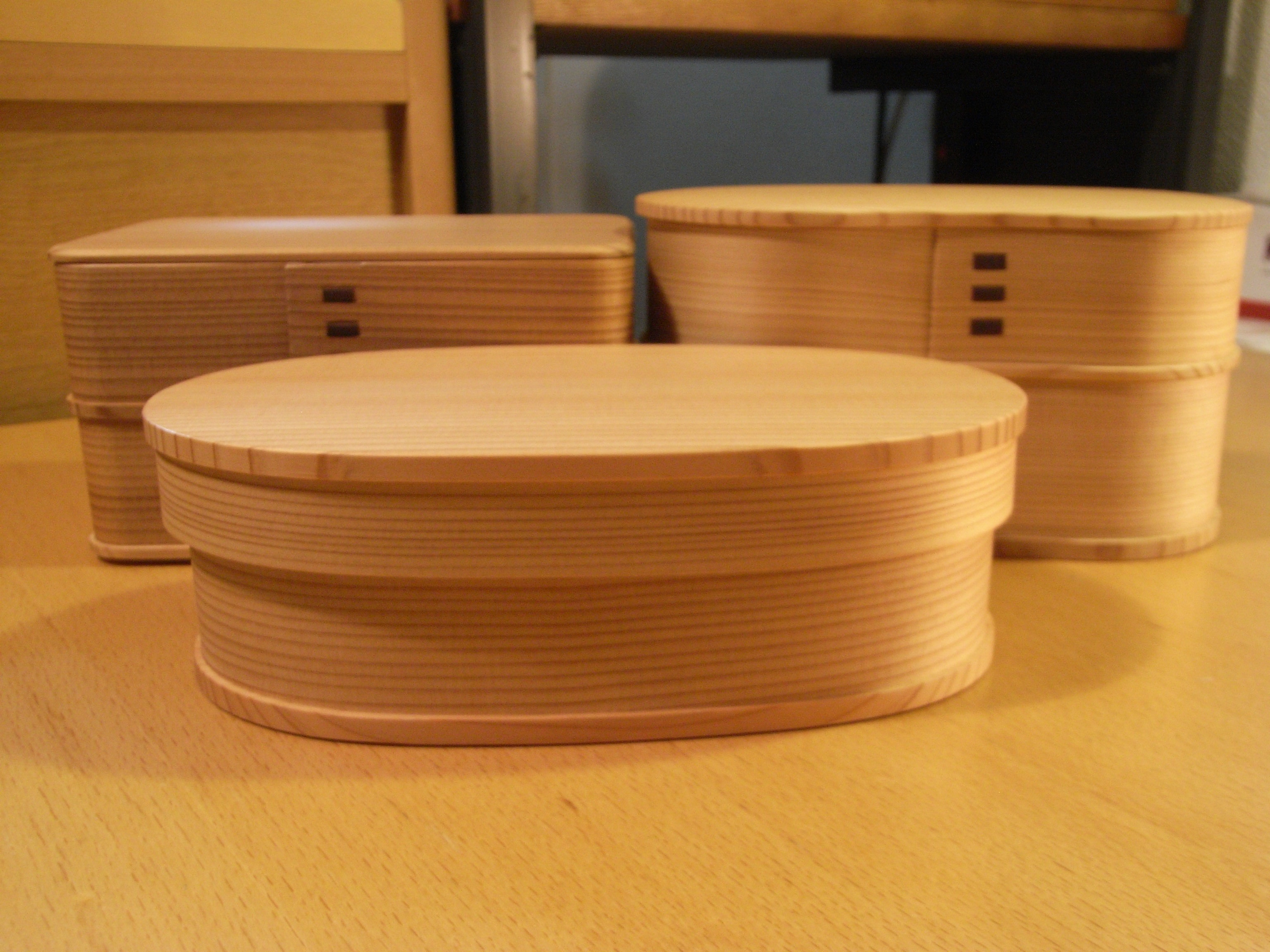 我が家の曲げわっぱ達